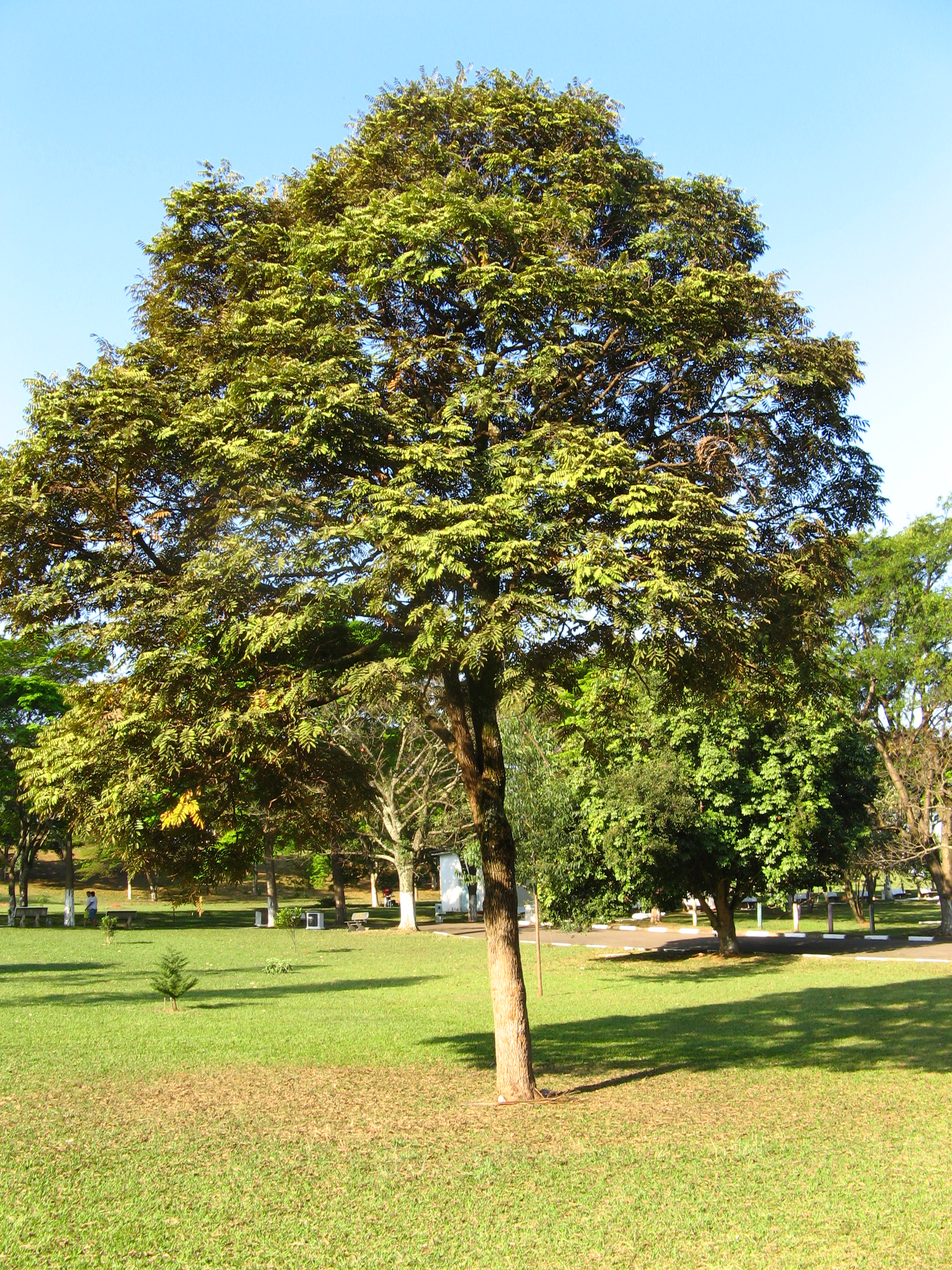 Cedro-rosa (Cedrela fissilis), Ceret Park, São Paulo